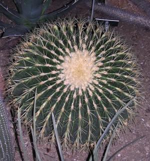 Echinocactus au jardin botanique de Lyon